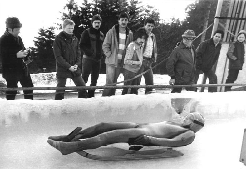 Melitta Sollmann ADN-ZB Schaar 21.3.1981-Bez. Suhl: DDR-Rennschlittenmeisterschaften-Weltmeisterin Melitta Sollmann führt nach den ersten beiden Einsitzer-Läufen bei den DDR-Rennschlittenmeisterschaften in Oberhof. Die Sportlerin vom ASK Oberhof erzielte eine Zeit von 1:24,73 (42,37-42,35).